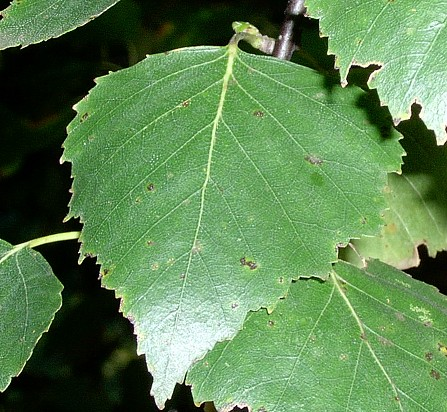 Betula pendula